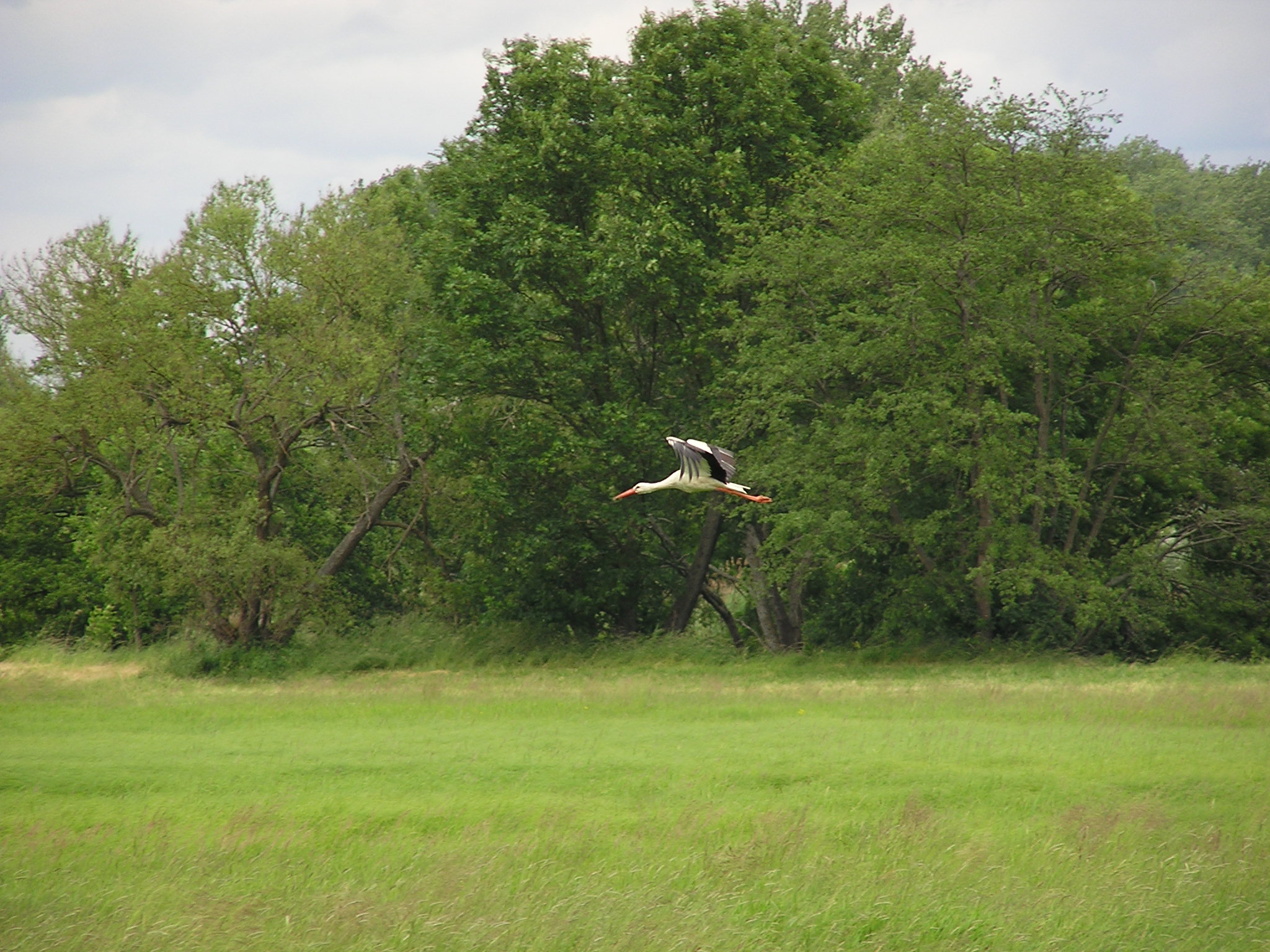 Une cigogne dans l'Illwald